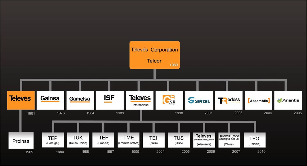 Организационная диаграмма корпорации Televes